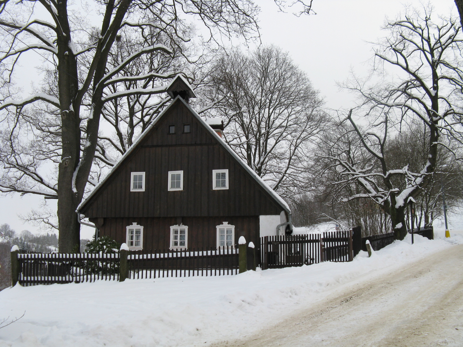 Venkovský dům, s omezením: bez objektu sušárny lnu (Jablonec nad Nisou), U Staré lípy 10/9, Jablonec nad Nisou